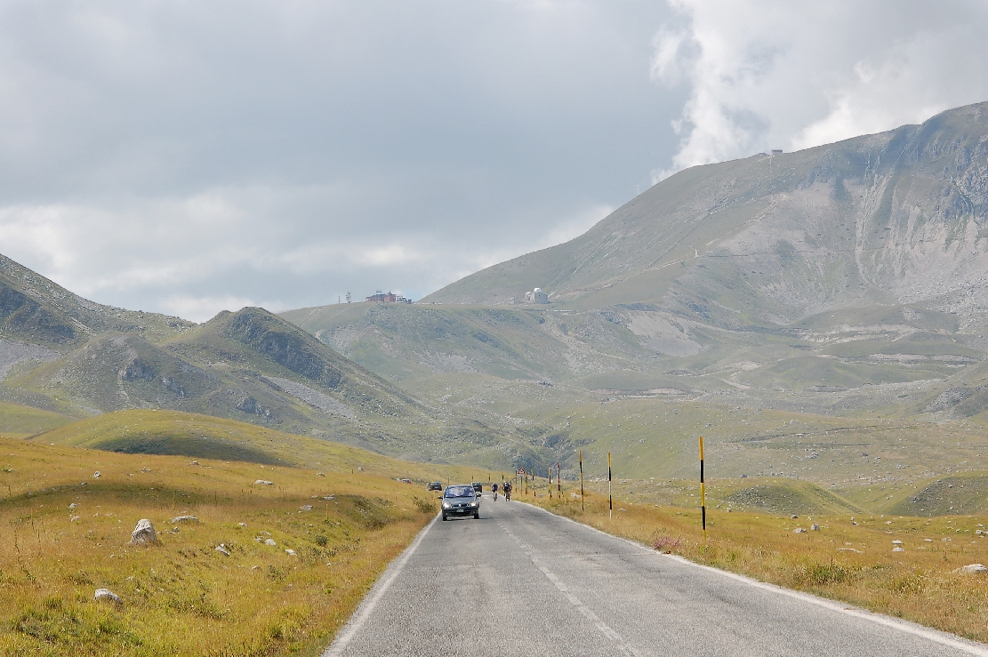 Campo Imperatore 2011